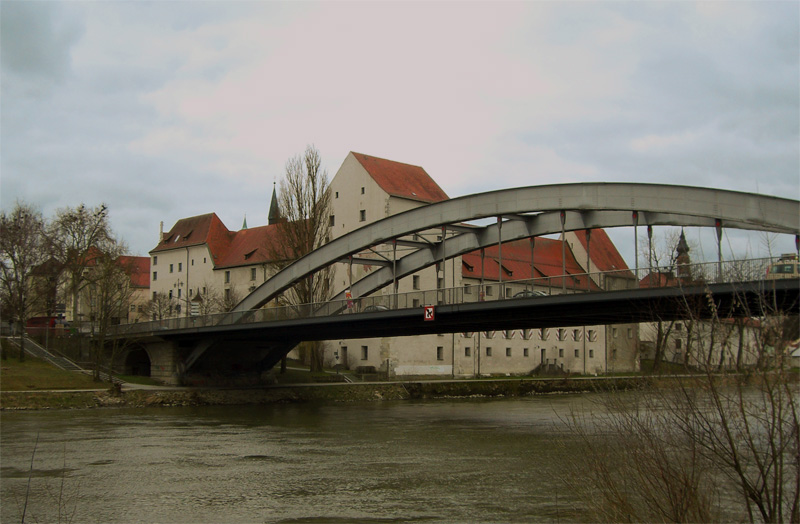 Herzogsschloss in Straubing, im Vordergrund die 'Schlossbrücke' über die Donau